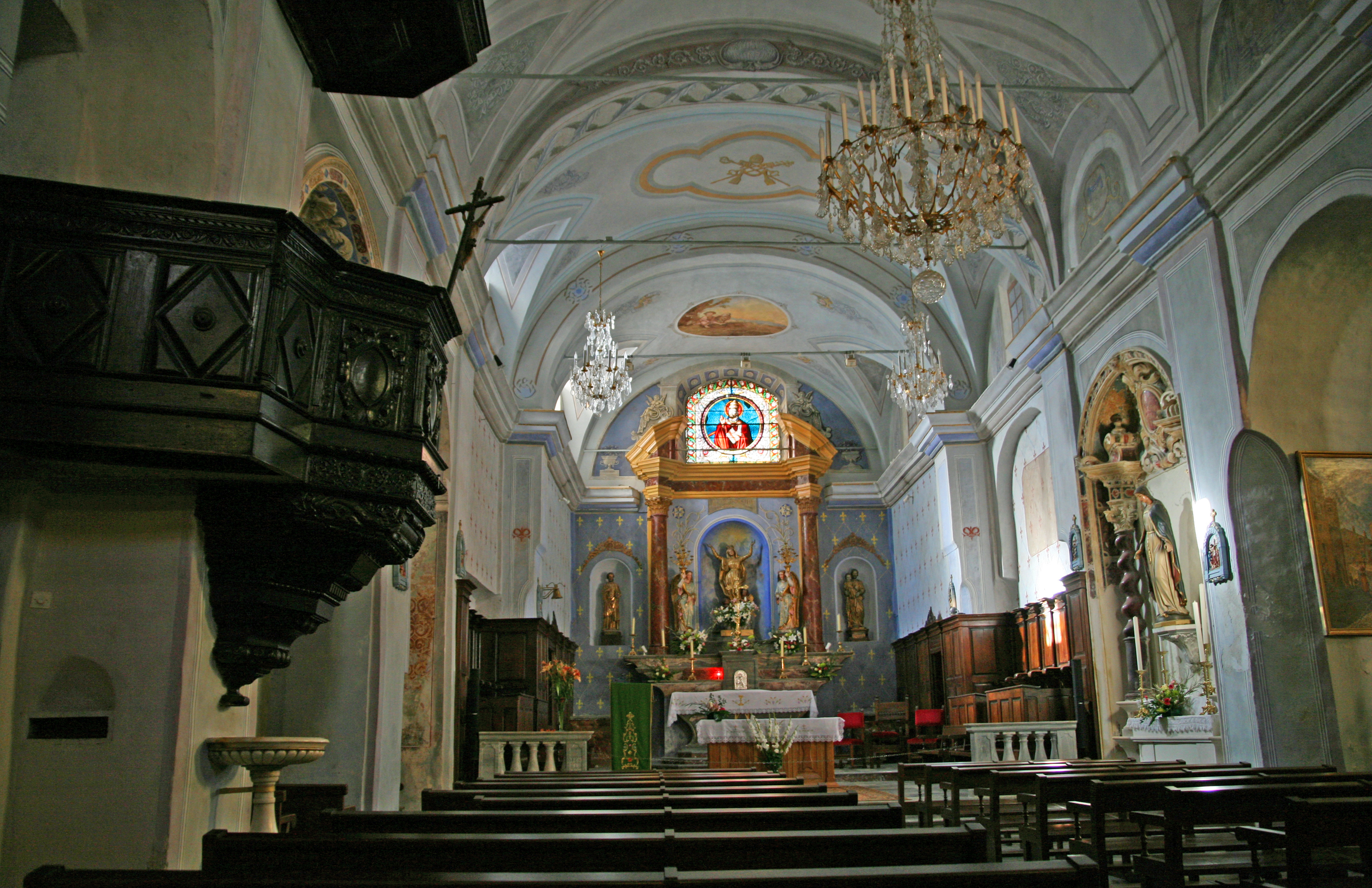 Corte (Corse) - Eglise de l'Annonciation de Corté